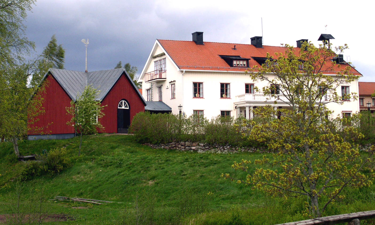 Stiftsgården med Enhetens kapell, Rättvik, Dalarna